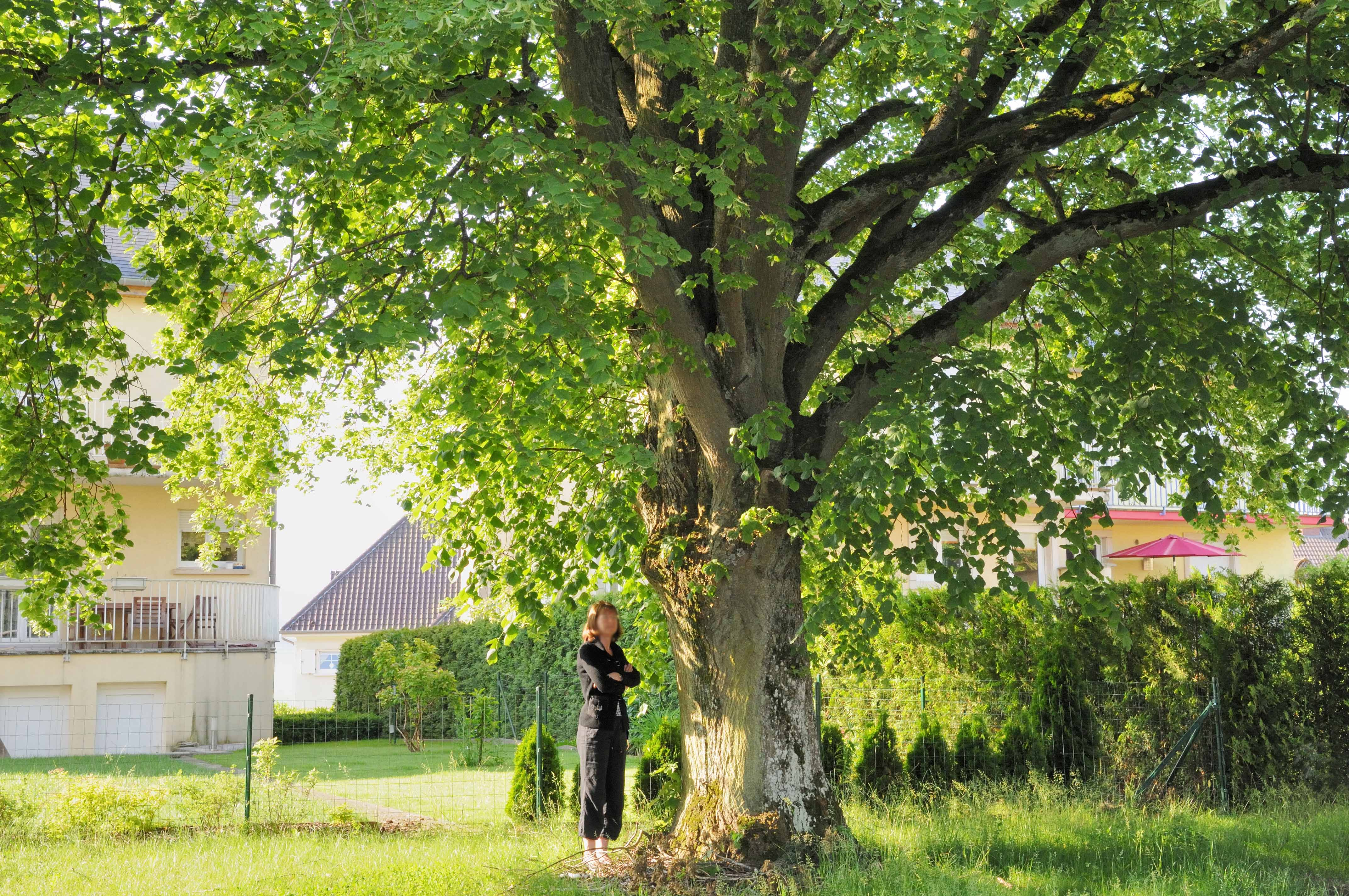 Lann zu Klengbetten.